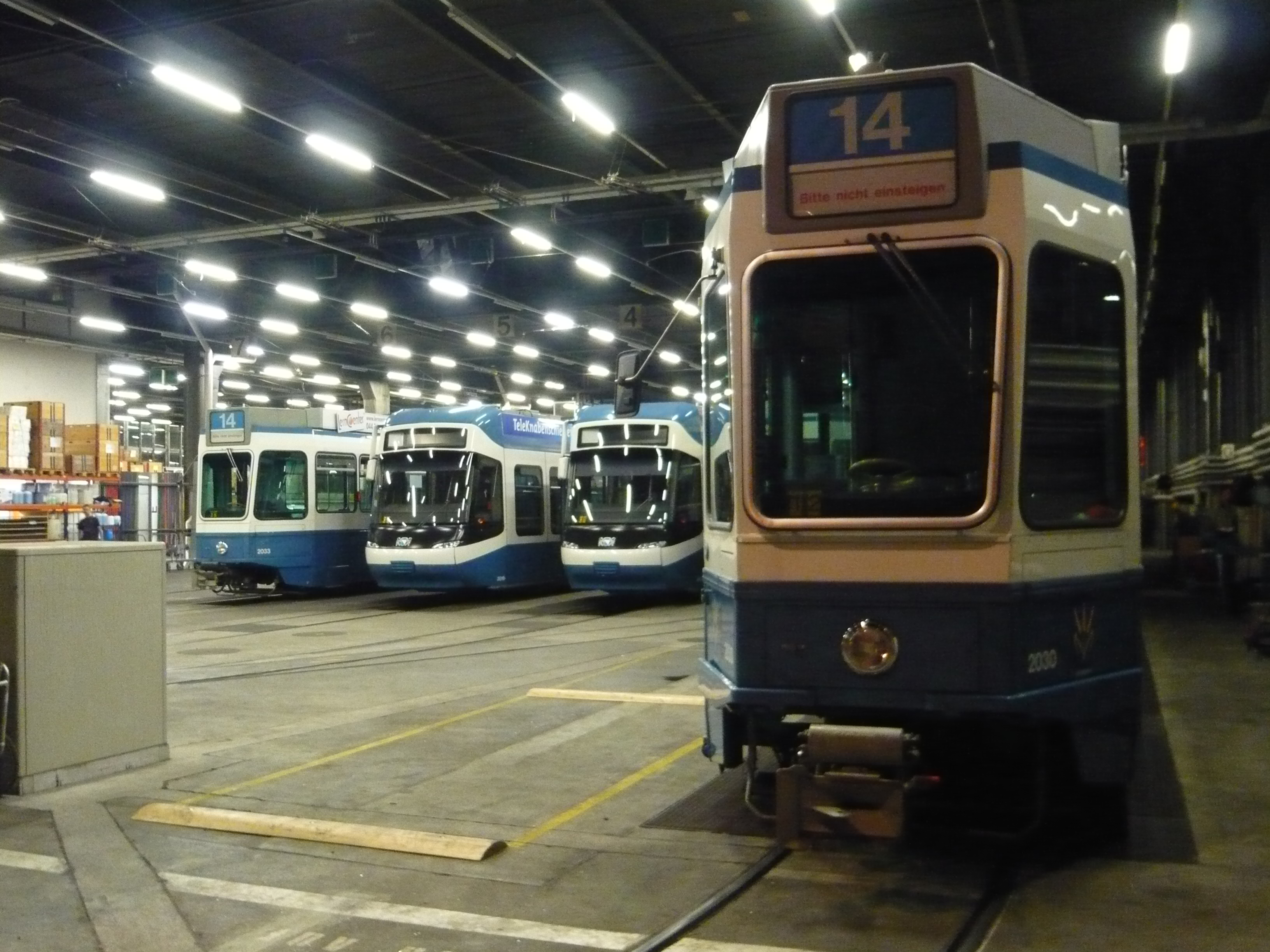 Tramdepot Kalkbreite (Straßenbahndepot) der Verkehrsbetriebe Zürich (VBZ)